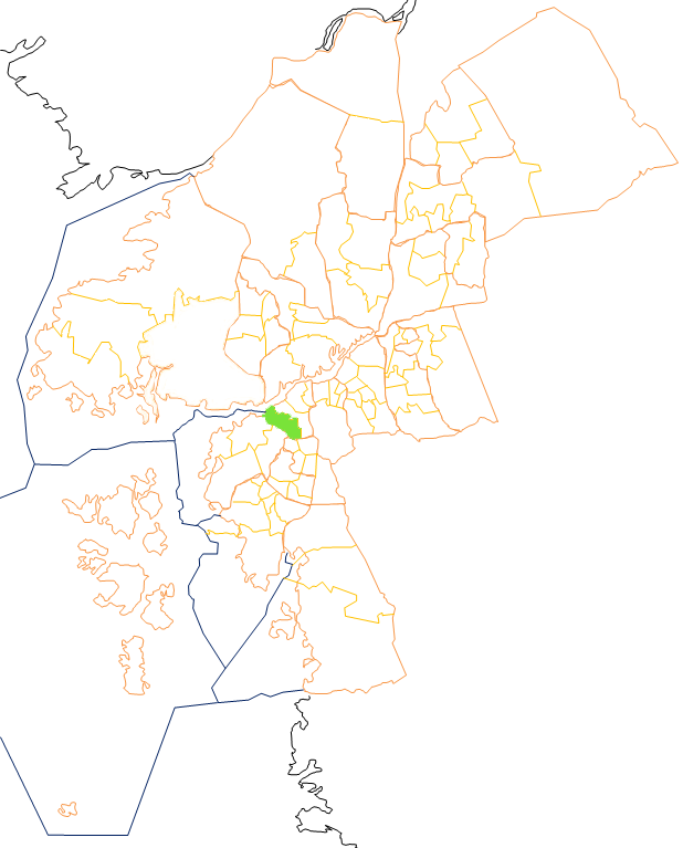 Karta som visar primärområdes belägenhet i Göteborg